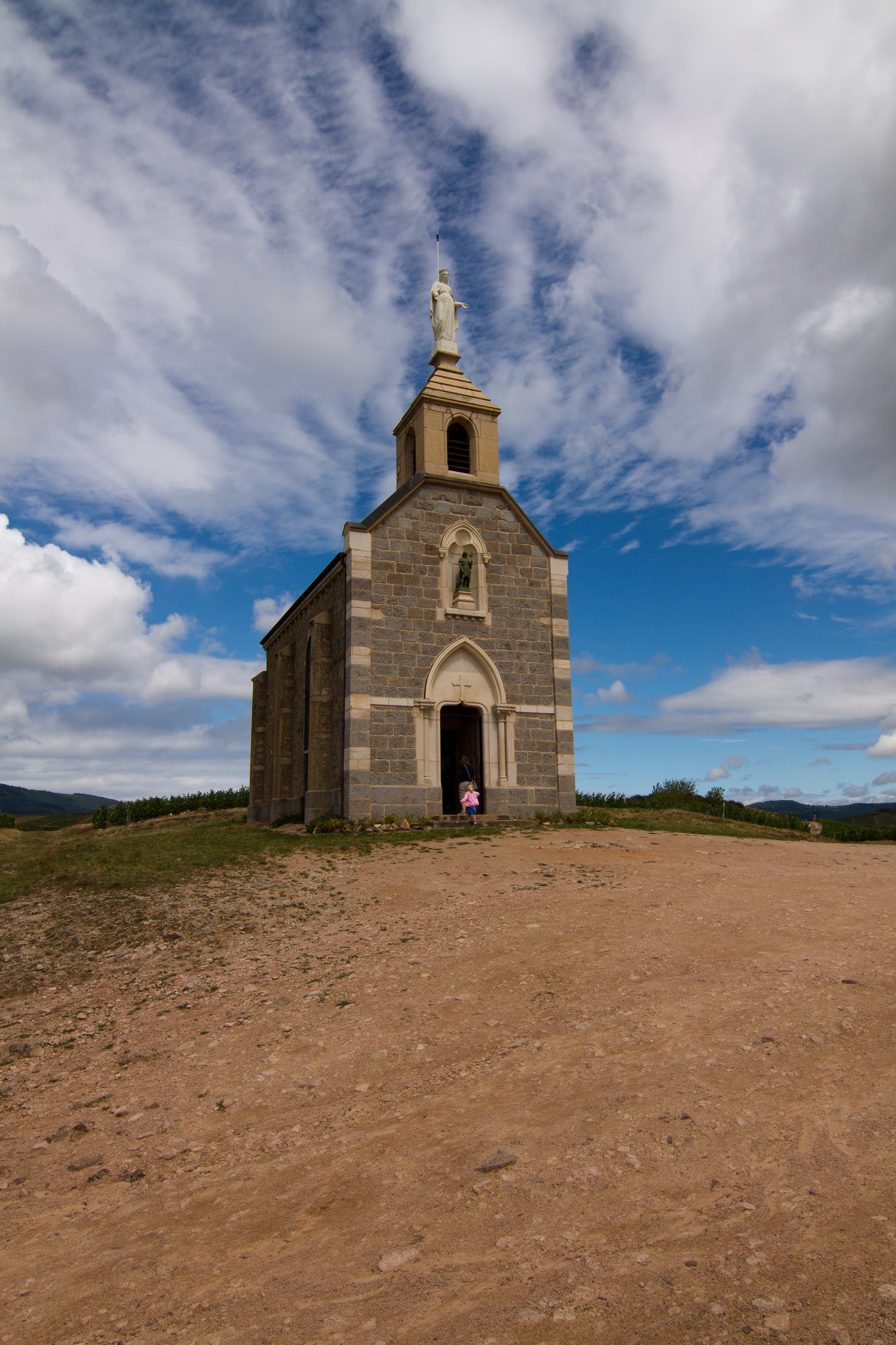 Vakantie Beaujolais 2011-111